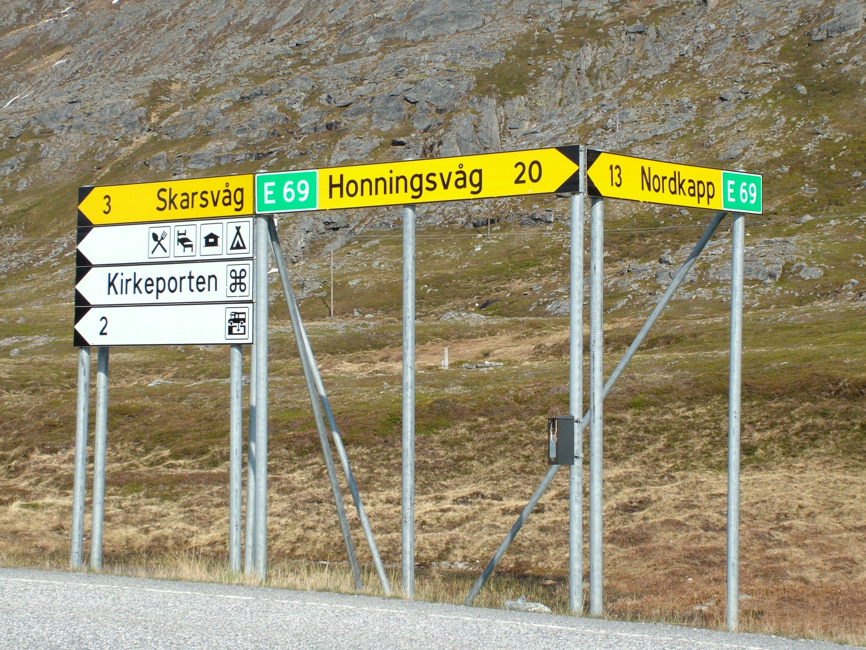 Schild der Europastrasse 69, kurz vor dem Nordkapp